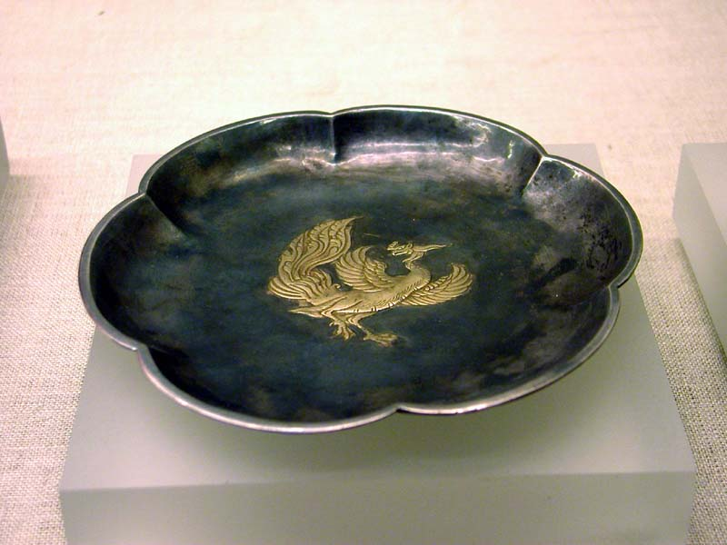 鎏金凤鸟纹六曲银盘 本文物zh:1970年发现于zh:陕西zh:西安zh:何家村唐代窖藏，原藏于zh:陕西省博物馆，藏品号七一45，高1.7厘米，宽15—16.4厘米。 zh:2004年7月展出于zh:北京大学zh:赛克勒考古与艺术博物馆，User:Mountainzh:2004年zh:7月28日拍摄。拍摄者已授权依照GFDL协议发布该图像。